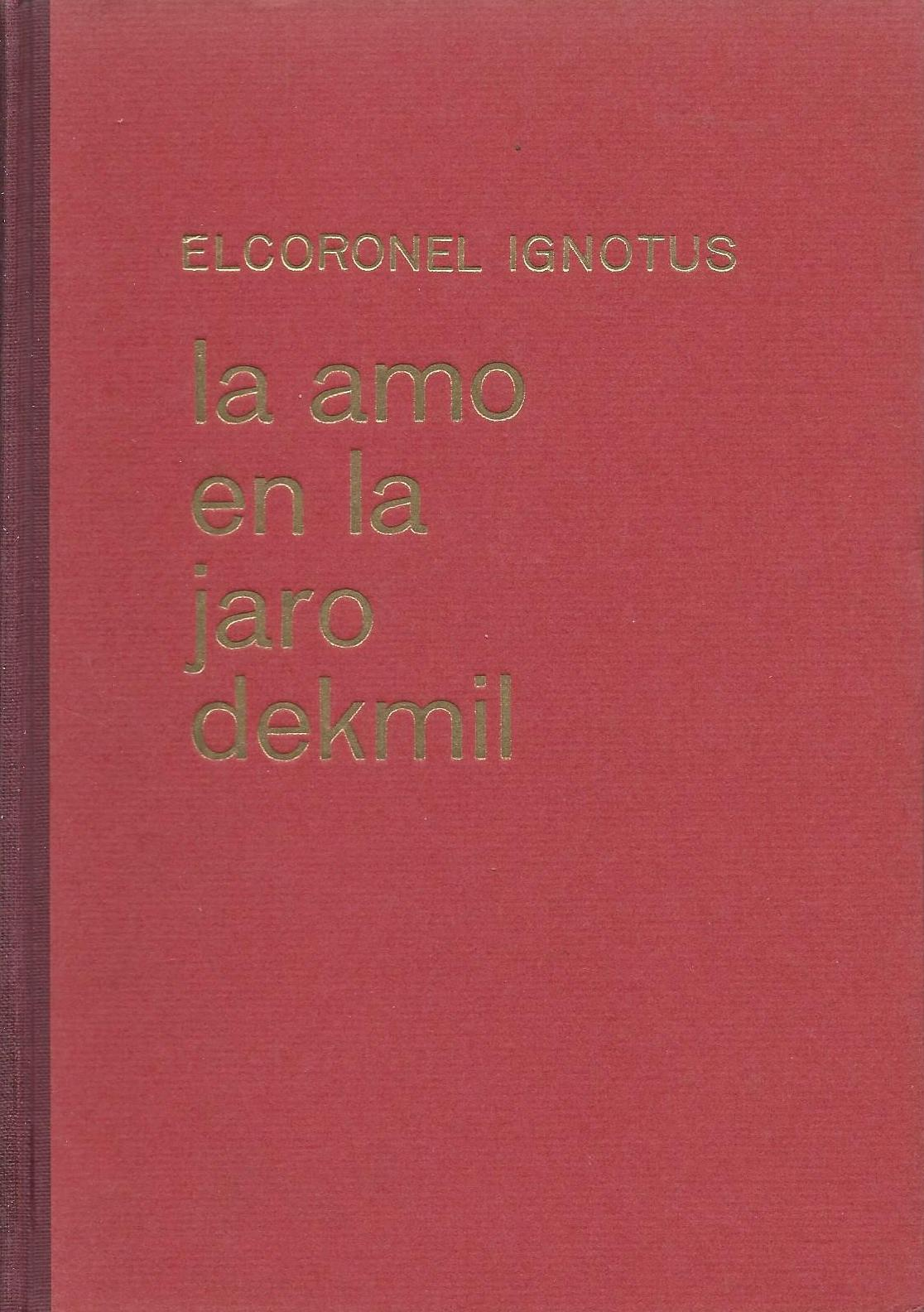 librokovrilo de "La Amo en la Jaro Dekmil", 1932